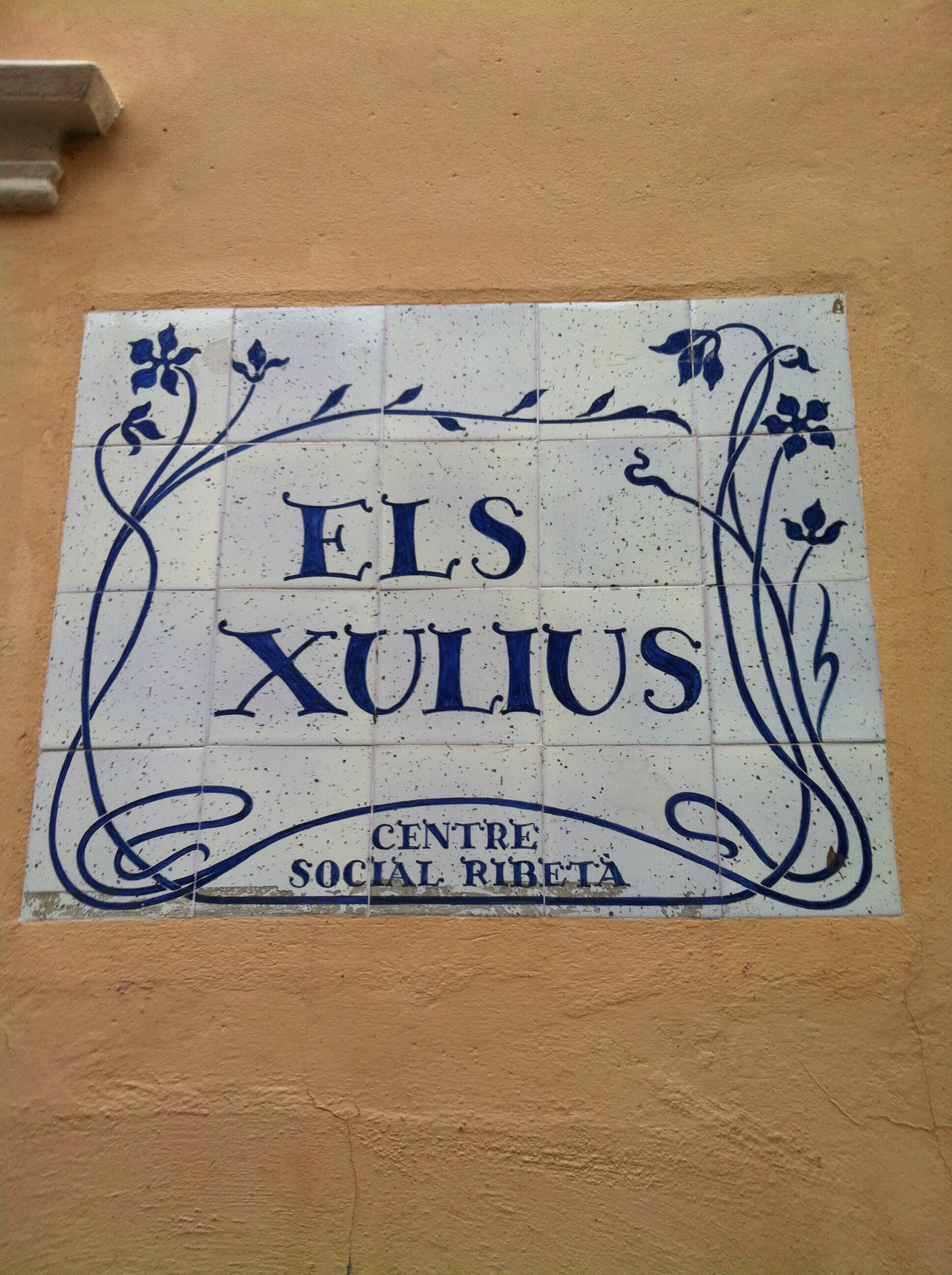 Els Xulius